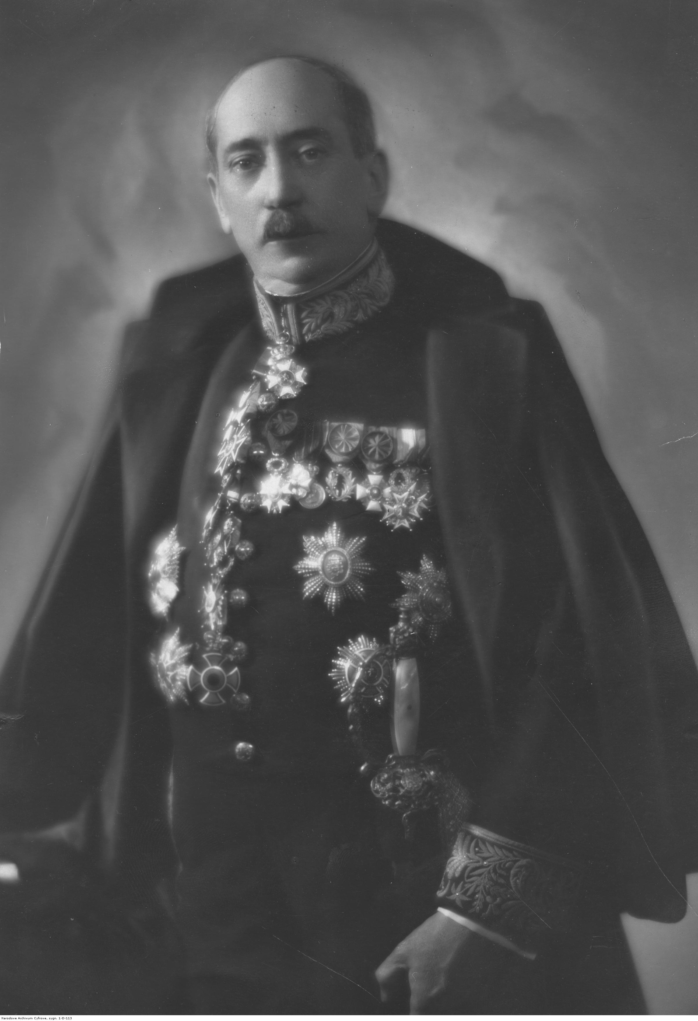 Georges Vaxelaire, né en 1873